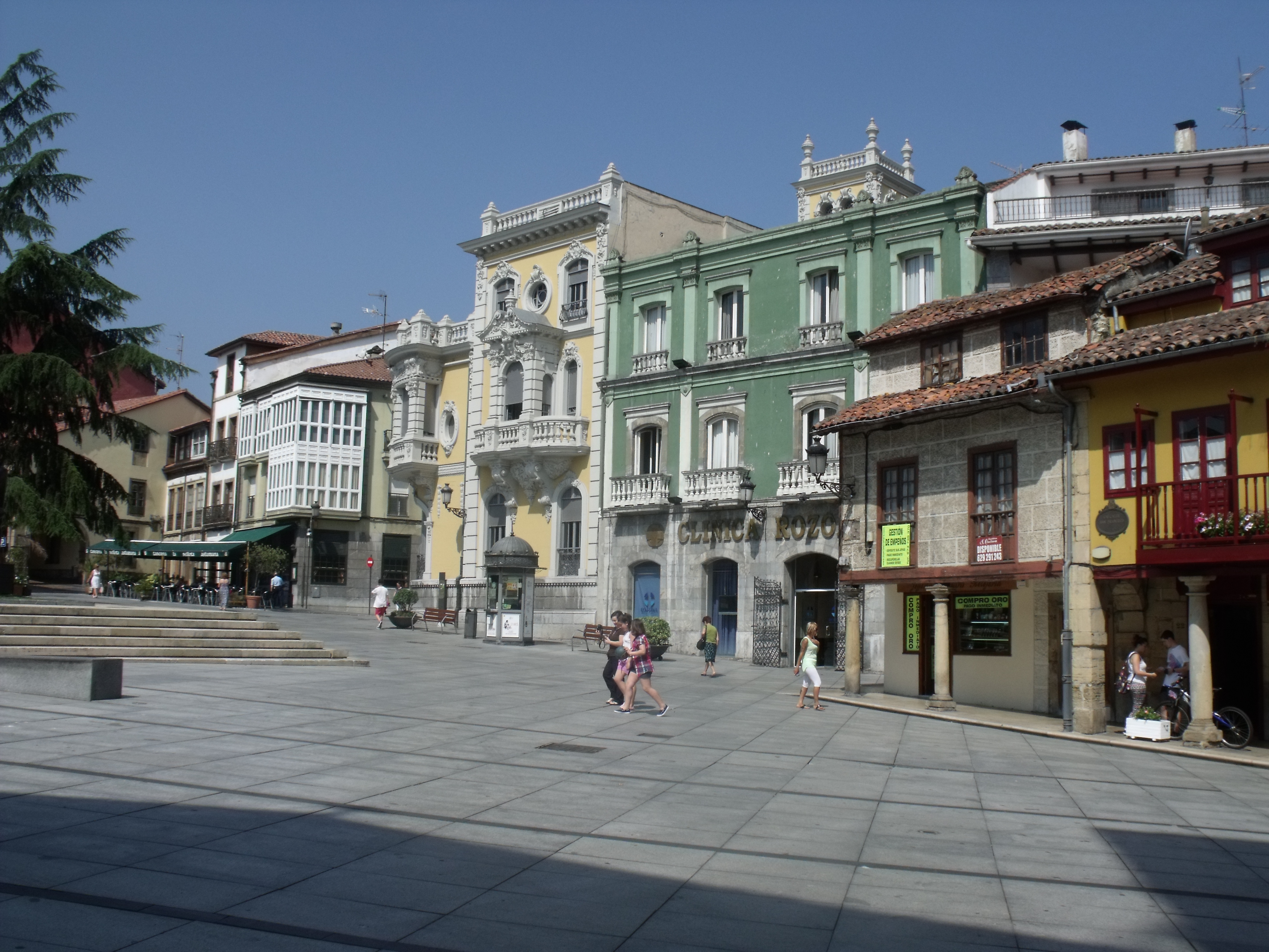 Calle de San Francisco y plaza de Domingo Álvarez Acebal. Avilés, Asturias.